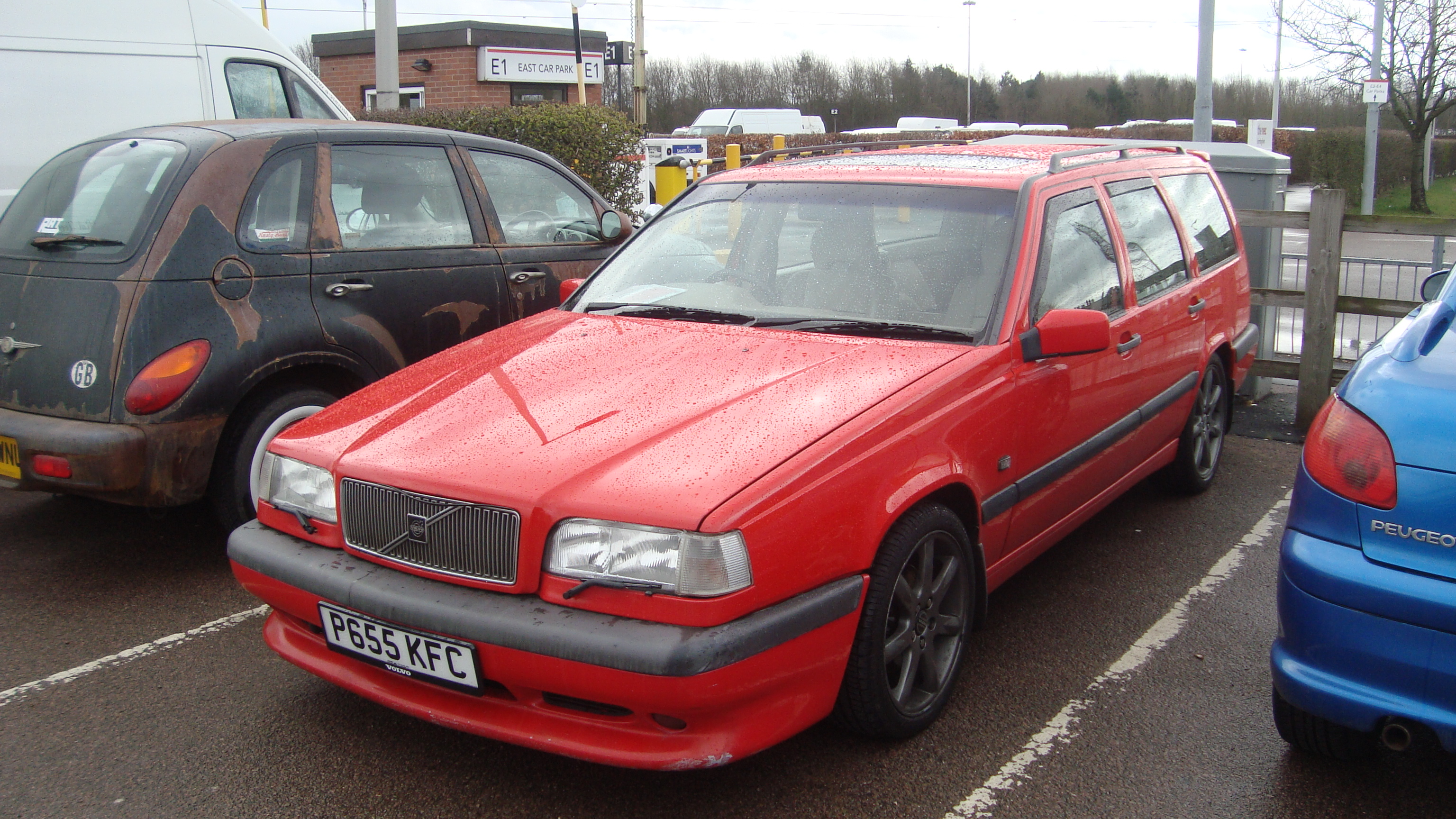 1996 Volvo 850 R Automatic Estate